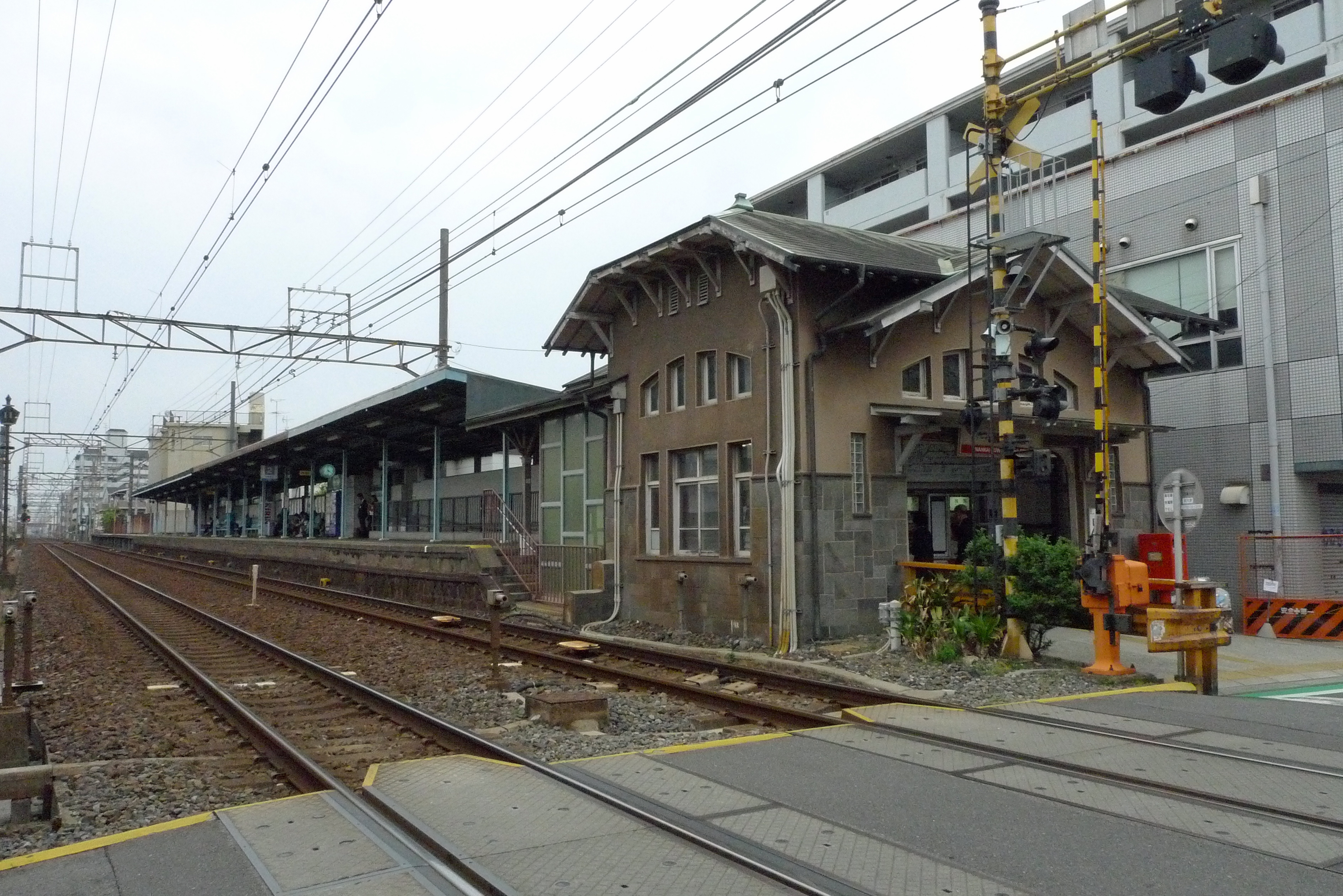 南海本線諏訪ノ森駅難波方面駅舎とホーム